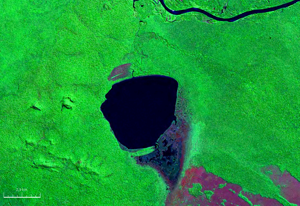 Vista satelital de la laguna Bellavista ubicada al norte del departamento de Santa Cruz (Bolivia).